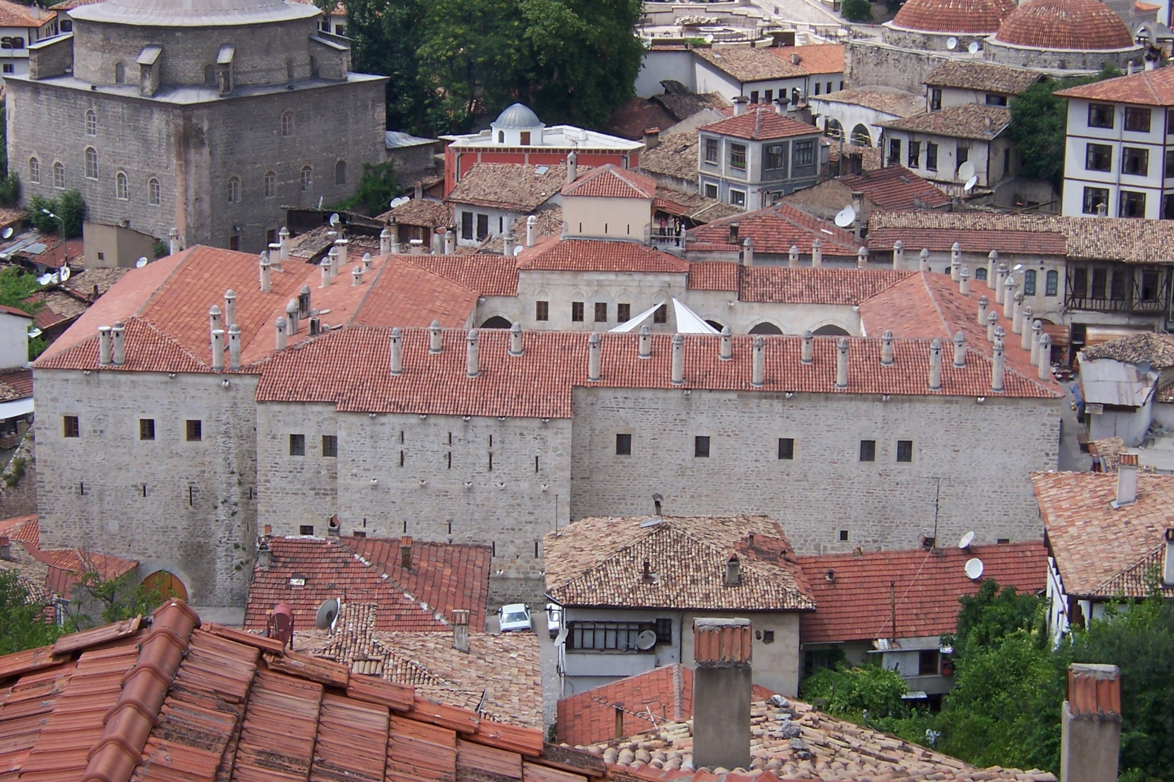 Safranbolu Cinci Han Otel, Safranbolu, Karabük, Turkey